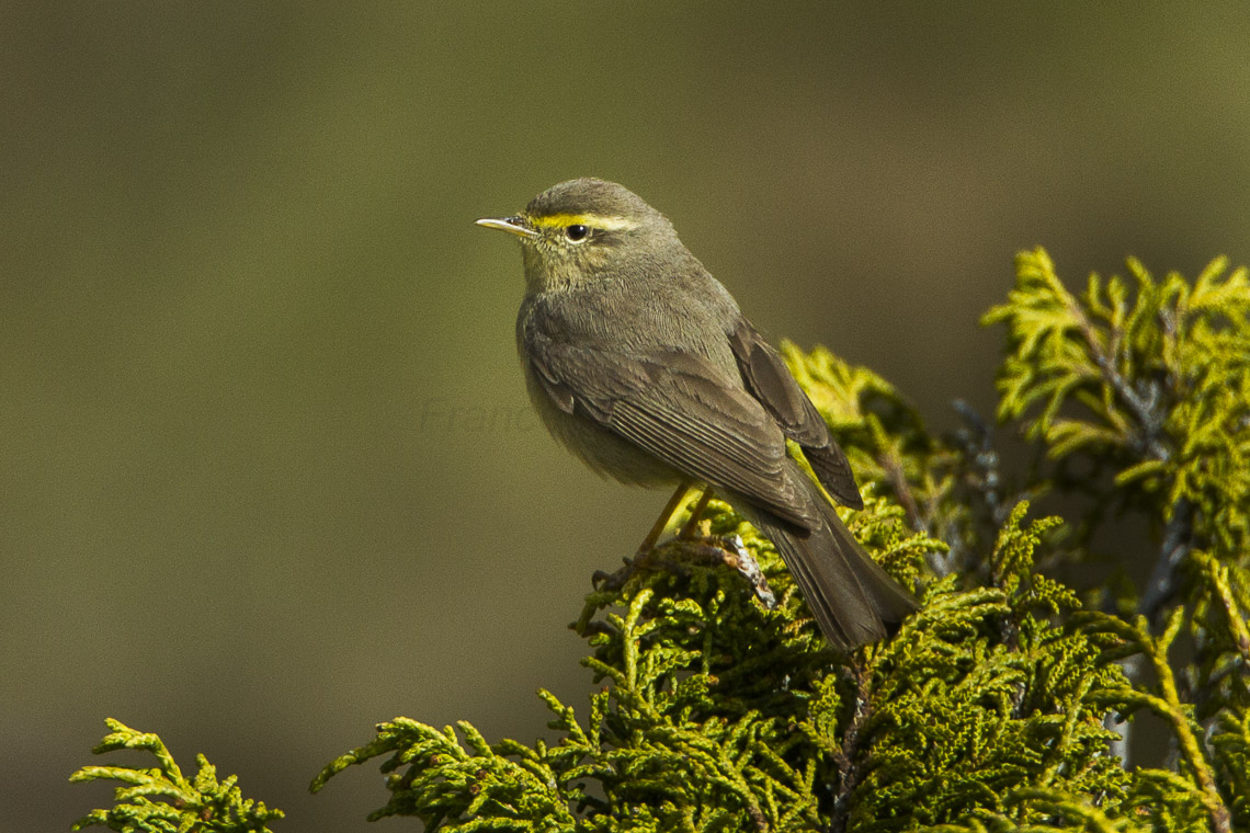 Sulphur-bellied Warbler - Kazakistan_S4E3694